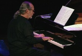 Músico brasileiro Gilson Peranzzetta em imagem do acervo da TV Brasil.